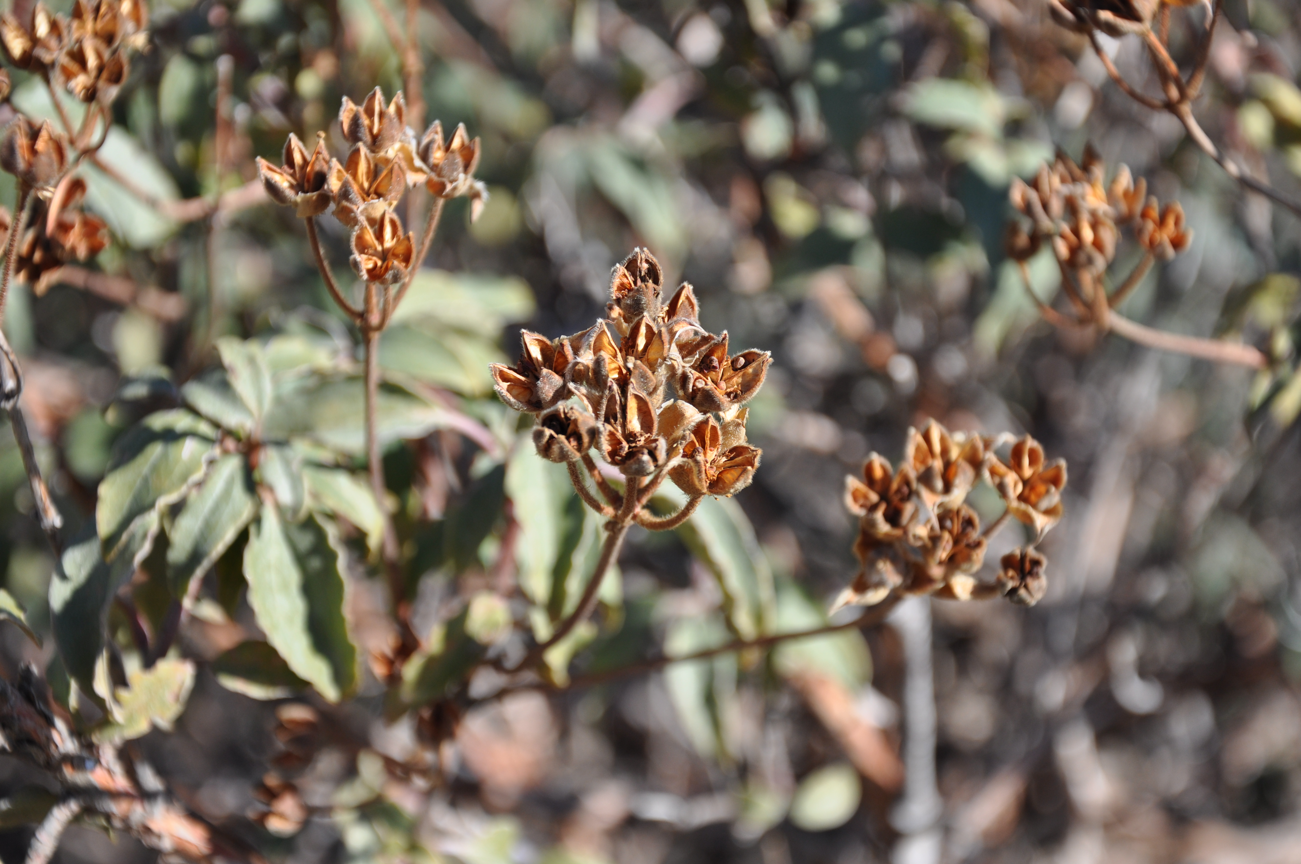 Jara estepa, (Cistus laurifolius), Sierra de Ávila, España.